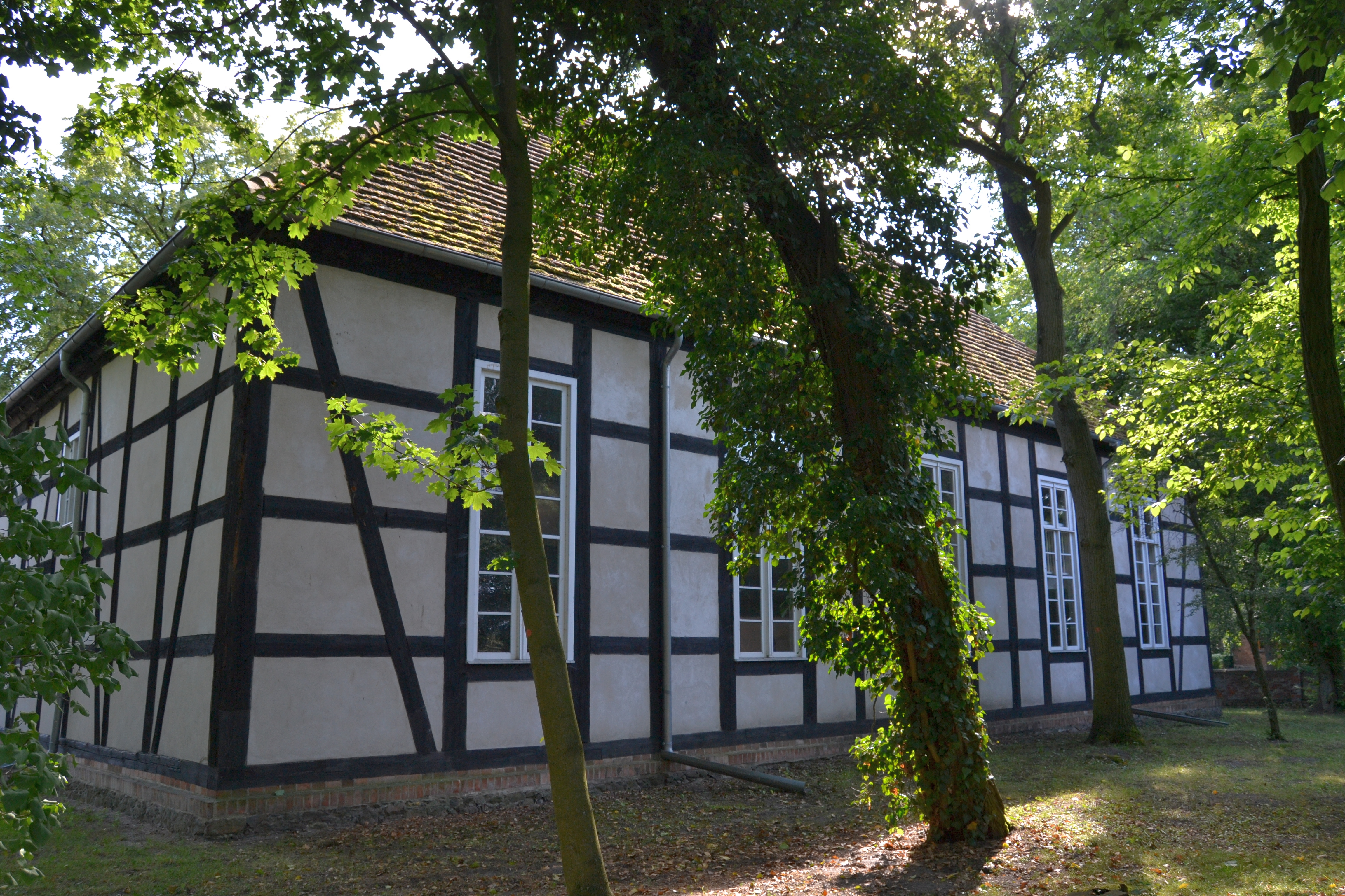 Baudenkmal Wilhelmsauer Dorfkirche mit Friedhof, Einfriedung und Grabsteinen für Ch. F. H. Lubow und Ch. F. Raasch. Die evangelische Kirche wurde 1820 erbaut. Die Ausstattung im Innern stammt aus der Bauzeit. Auf dem Friedhof befinden sich mehrere Grabsteine aus dem 19. Jahrhundert. Fotoprojekt – Zwischen Berlin und Oder 2014 Photo project “Between Berlin and River Oder 2014”